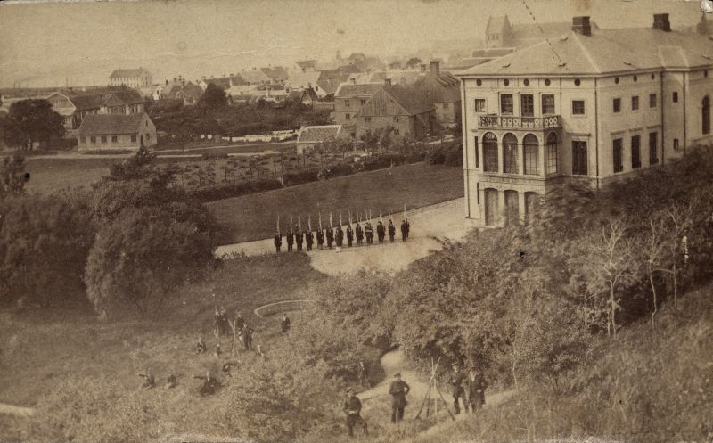 Militärer utanför Konsul Perssons villa, då kallad Essenska villan, i Helsingborg. Före 1877.